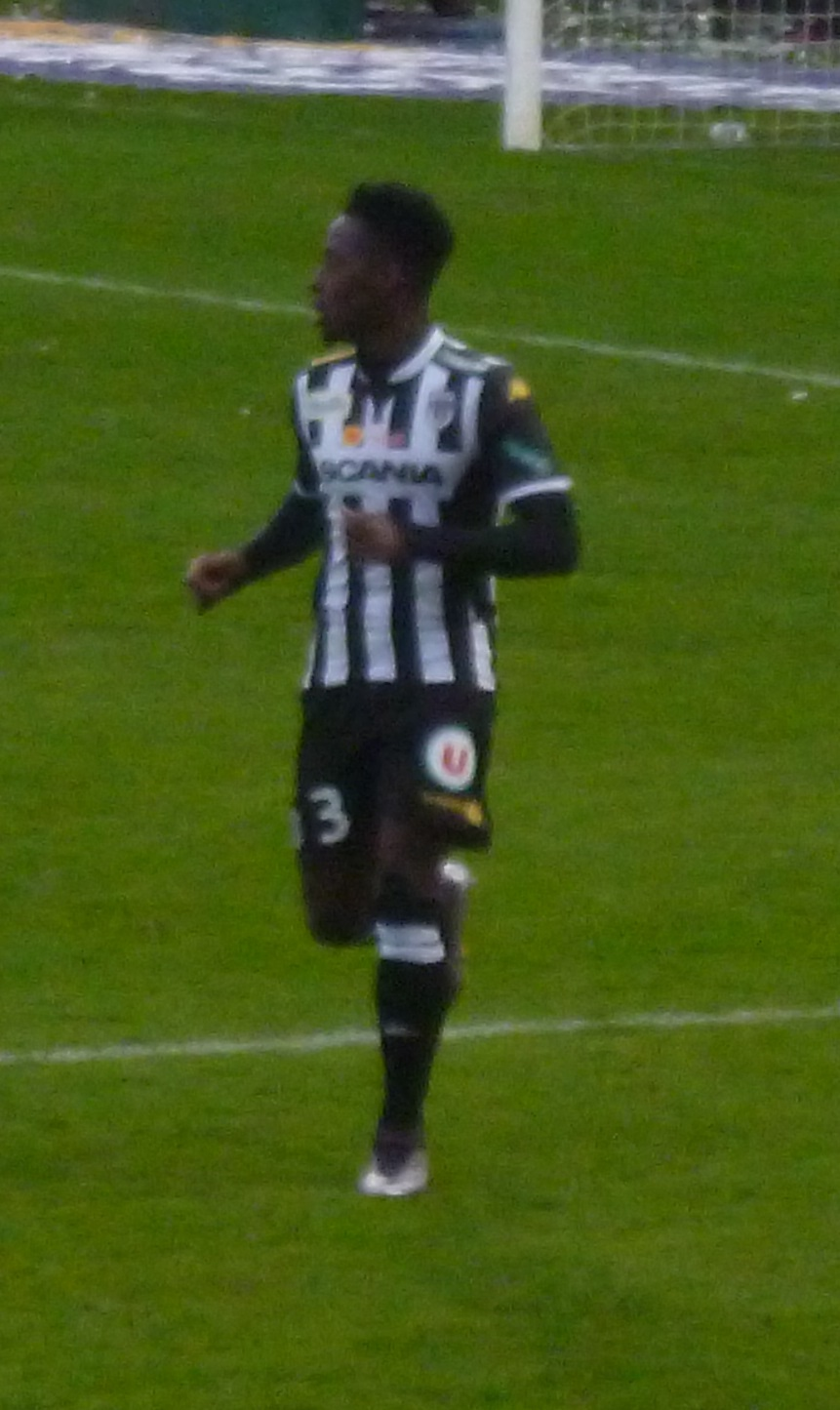 Le footballeur franco-congolais Arnold Bouka Moutou, sous le maillot de l'Angers SCO, lors de la rencontre de Ligue 1, contre le Gazélec FC Ajaccio, au stade Jean-Bouin d'Angers.